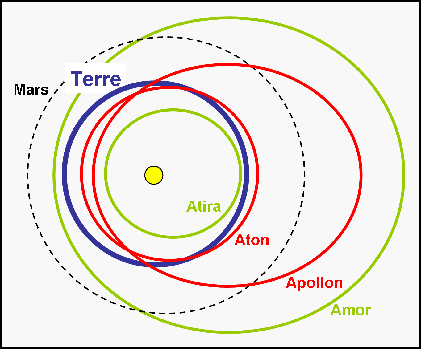 Le Soleil est représenté en jaune. L'orbite de la Terre est en bleu. Les orbites rouges correspondent aux orbites des "géocroiseurs stricts" (1862) Apollon (croiseur extérieur) et (2062) Aton (croiseur intérieur). Les orbites vertes correspondent aux orbites des "géofrôleurs" (1221) Amor (frôleur extérieur) et (163693) Atira (frôleur intérieur). L'orbite de Mars est représentée en pointillés. Les orbites sont à l'échelle (demi-grand axes et excentricités).Attention : les orbites ont été ramenées dans le même plan et les périhélies ont été alignés ; les orientations relatives réelles sont différentes.